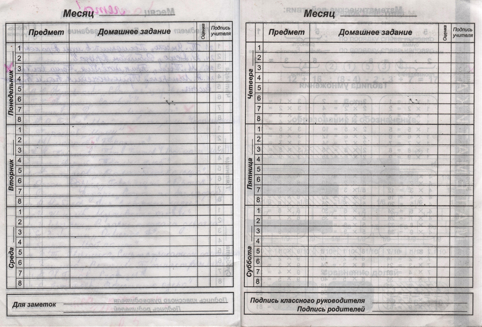 Типичная недельная разметка школьного дневника